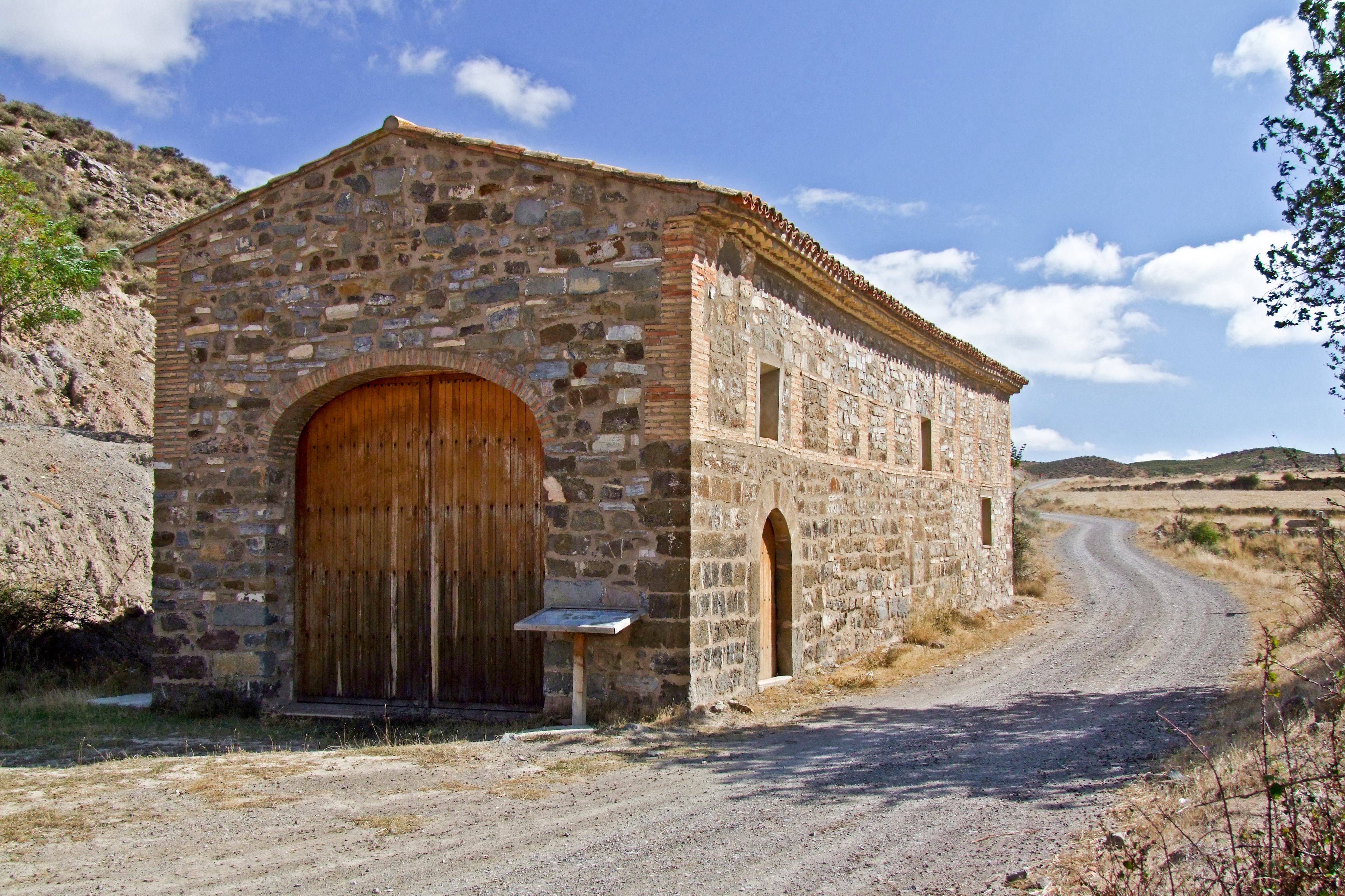 Ermita del Cristo en la localidad de Ambas Aguas, La Rioja - España